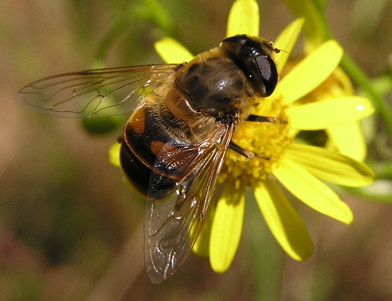 Eristalis tenax bei Köln.